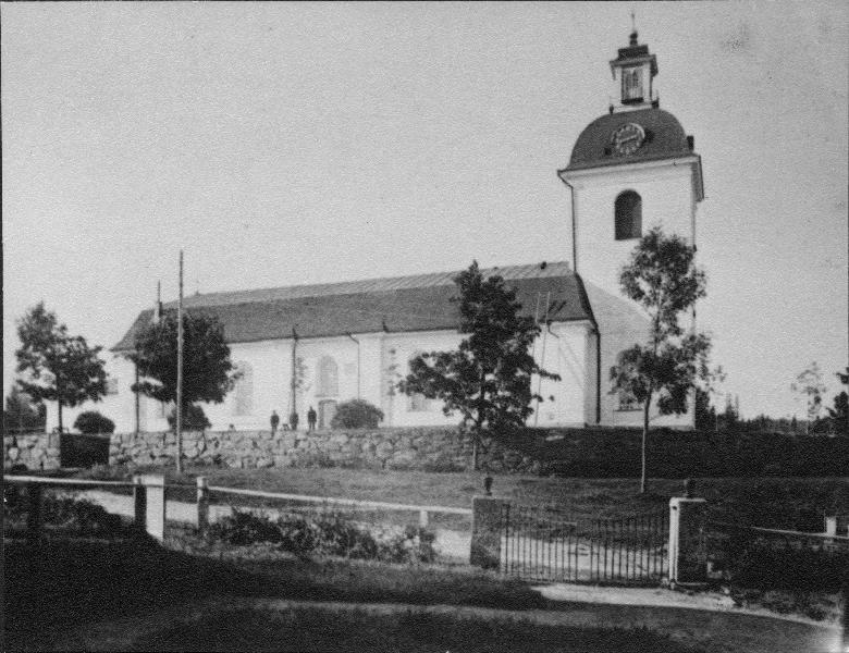 Kyrkobyggnaden, Kategori: (01) ExteriörerKyrkobyggnaden,.